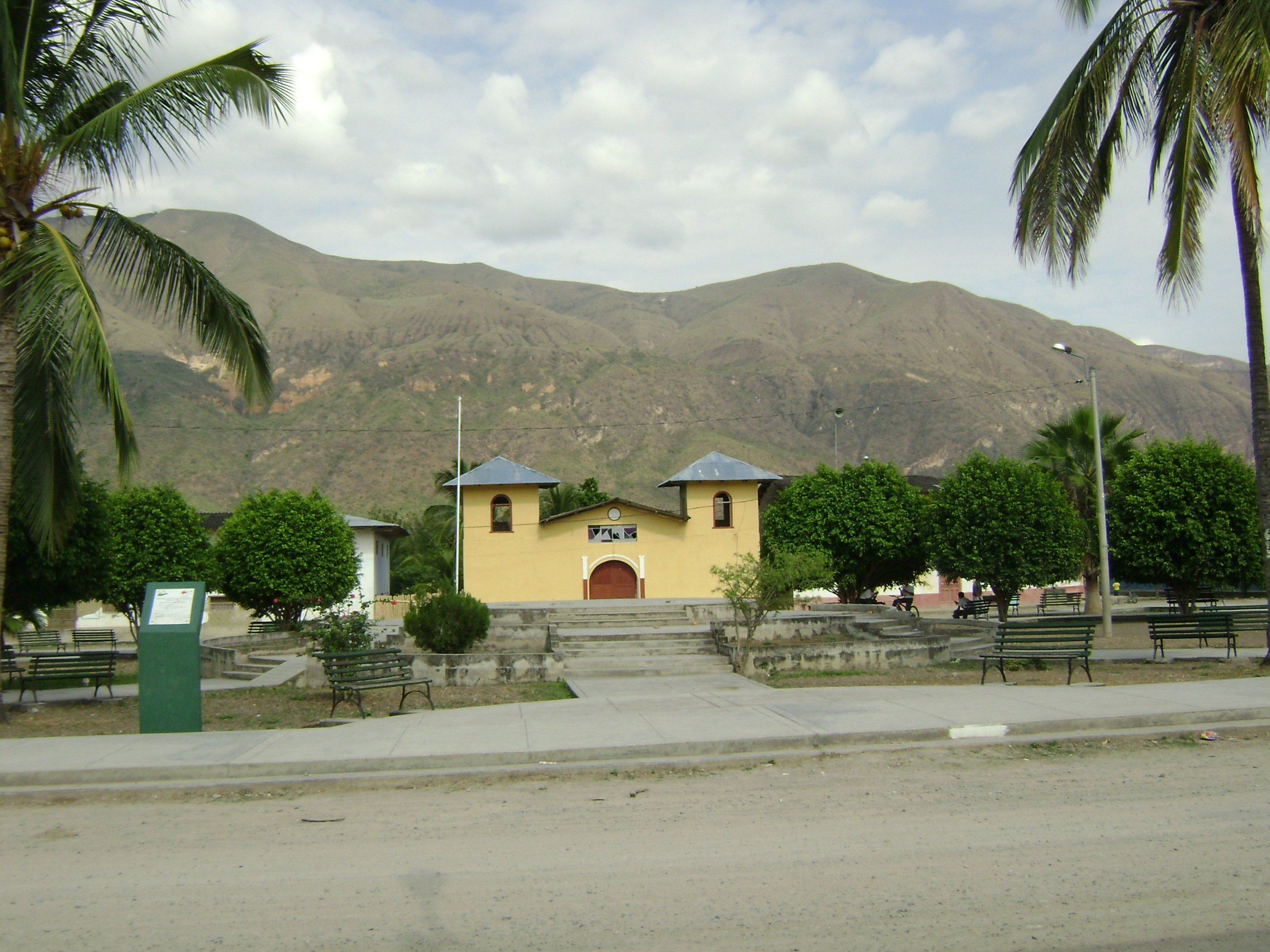 lalo